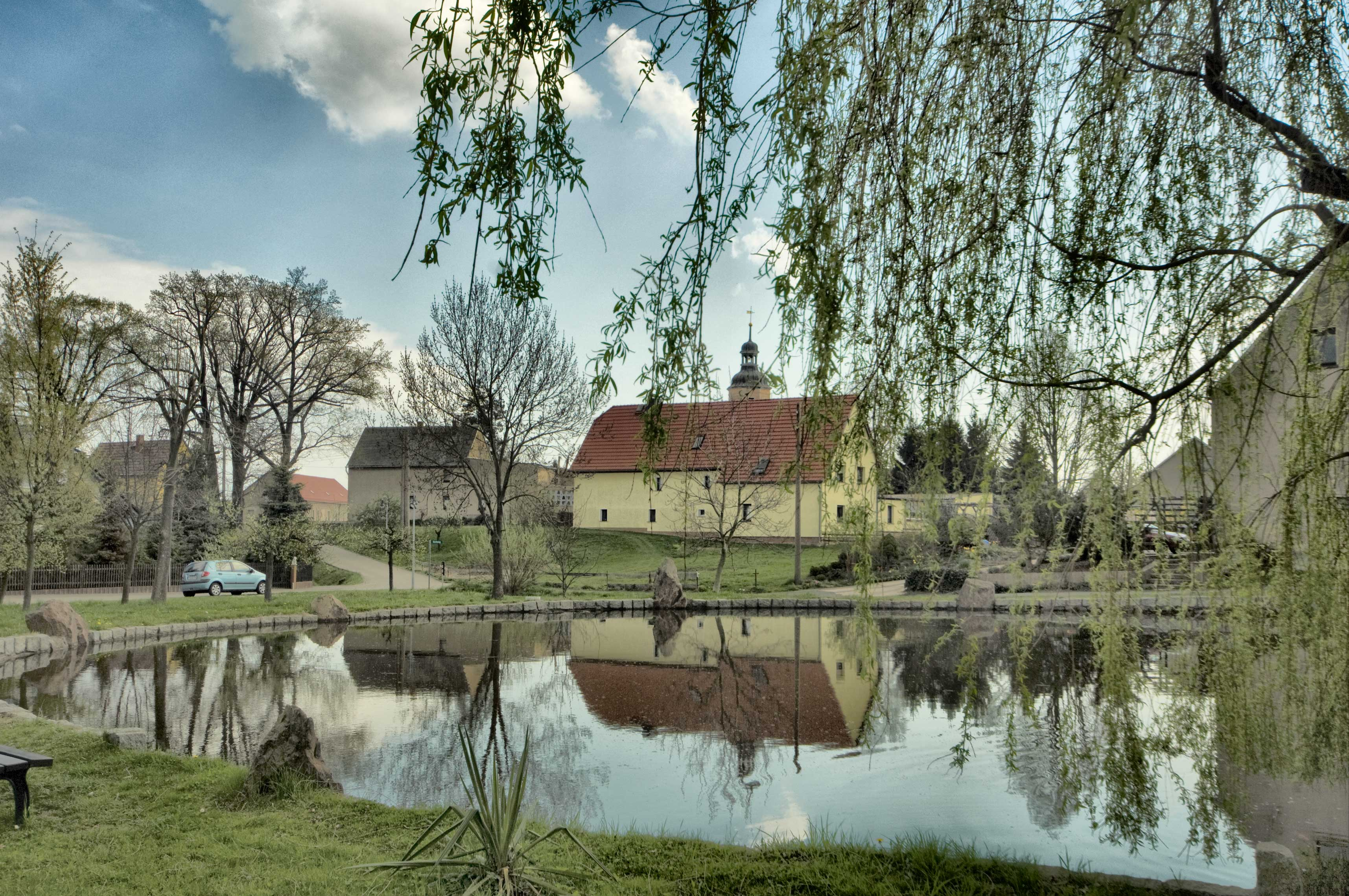 Am Ortsanger in Lampersdorf, Gemeinde Wermsdorf in Sachsen